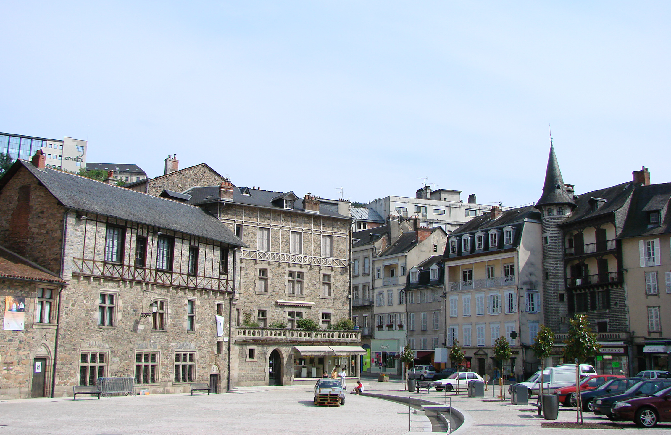 Tulle, devant la cathédrale.